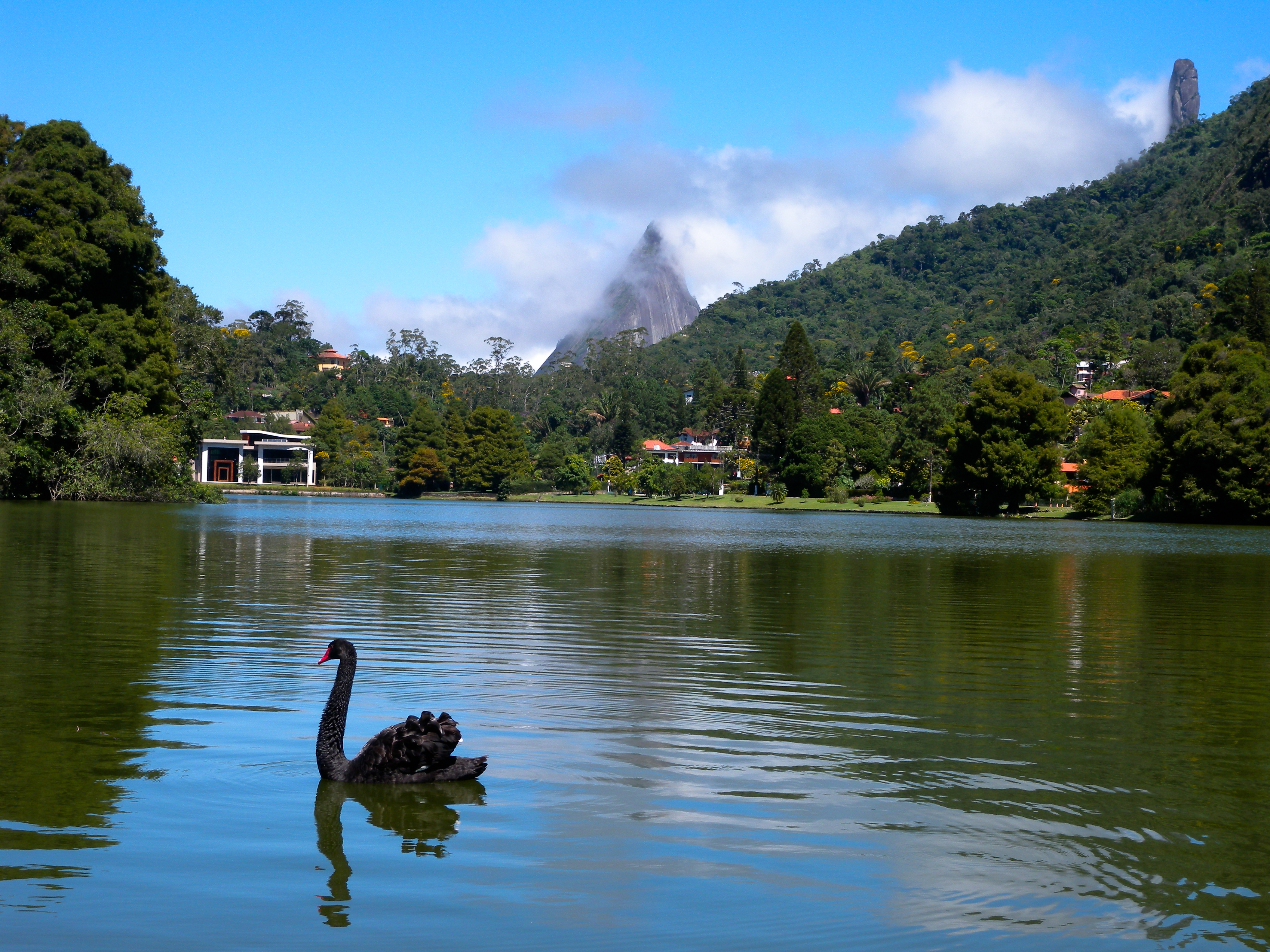 Granja comary Cisne - Escalavrado e Dedo De Deus ao fundo -Teresópolis